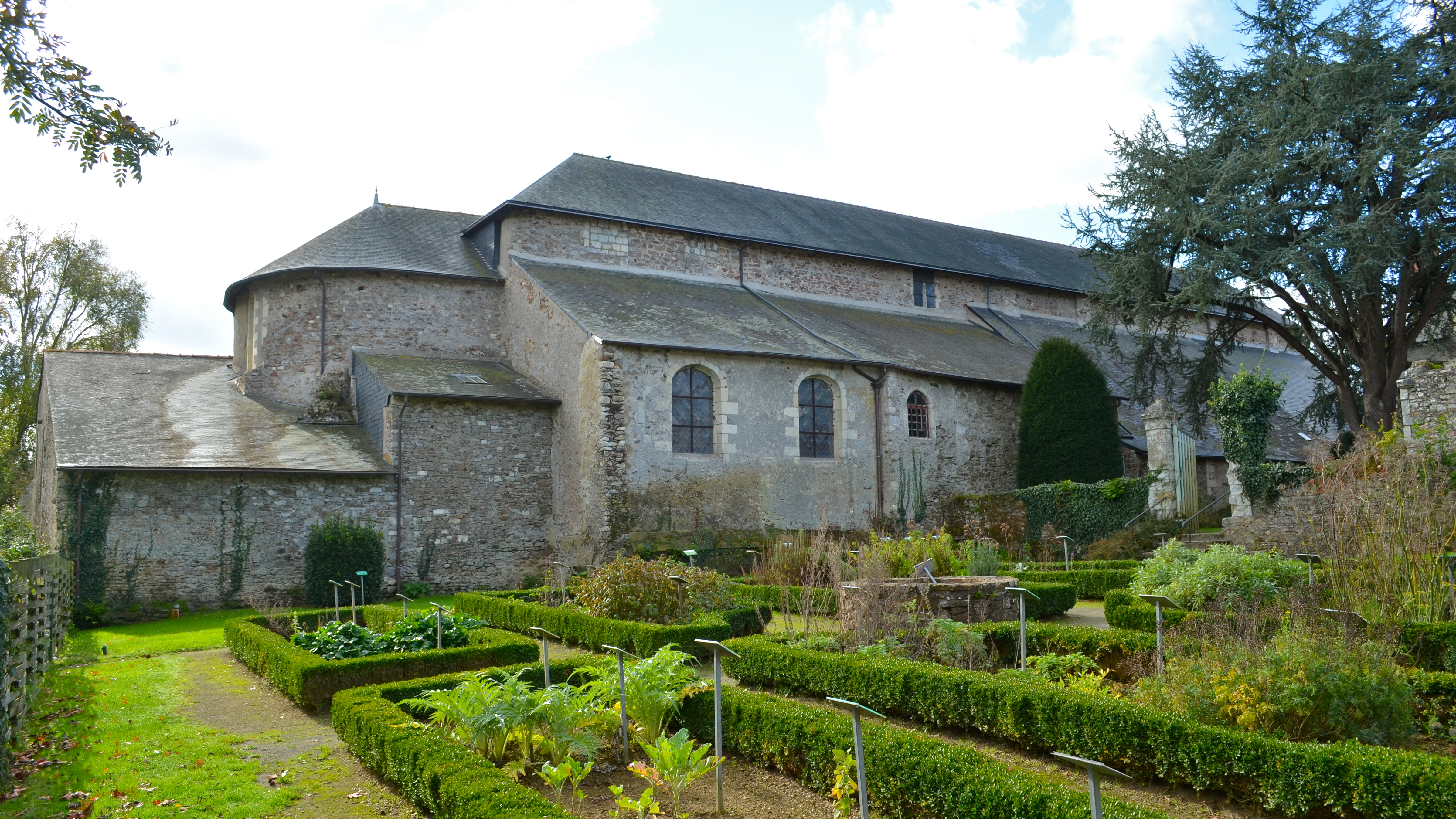 Abbatiale de Saint-Philbert-de-Grand-Lieu (Loire-Atlantique)